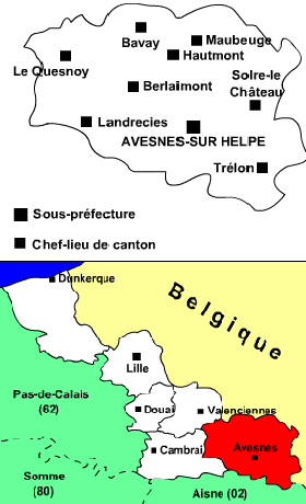 Arrondissement_avesnes_nord_59haut LÃ©gende : (actu) = image de Manchot sanguinaire modifiée